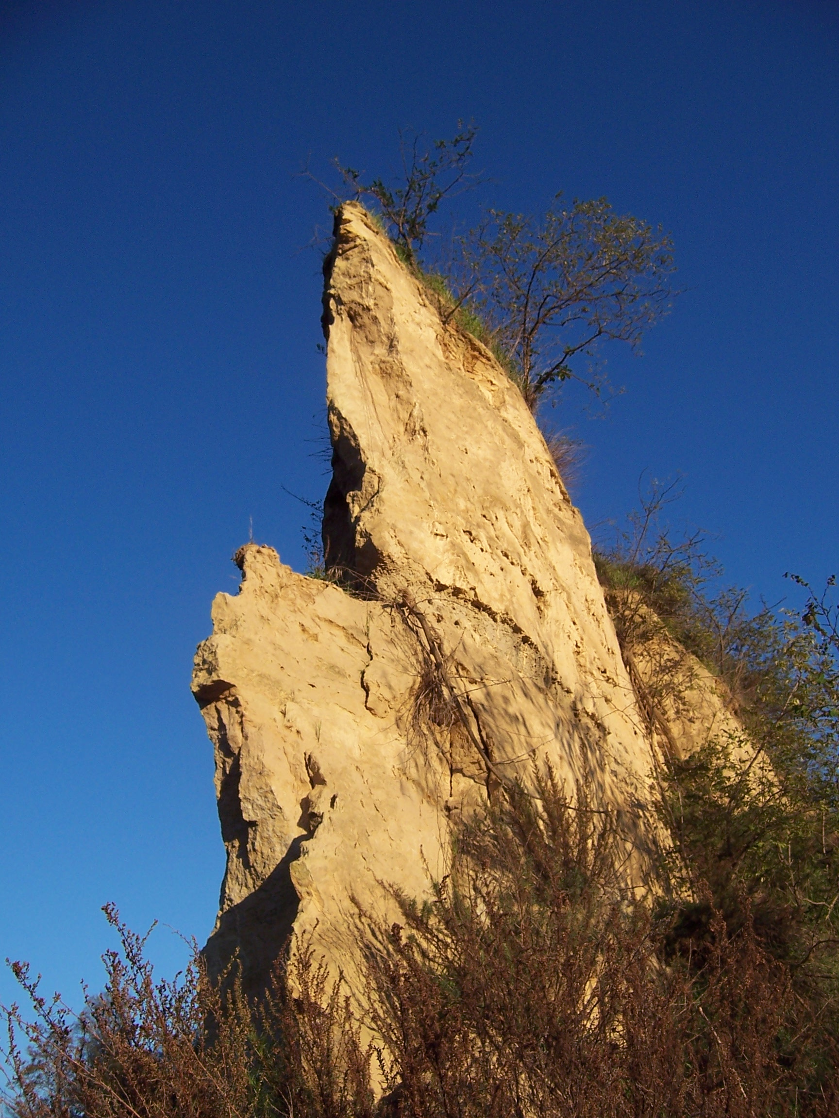 Rocche del Roero